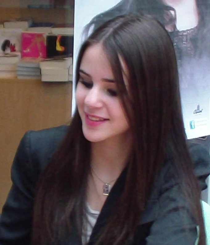 Image recadrée du personnage